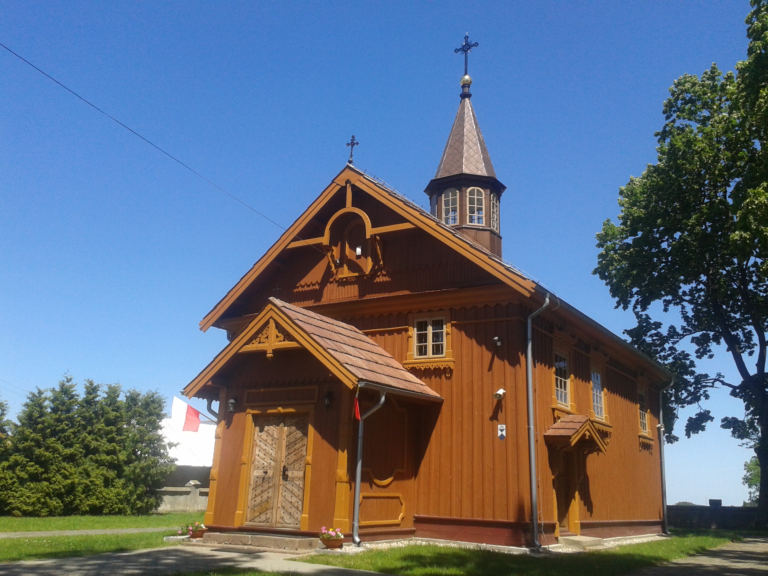 Kościół w Rogowie (dawna cerkiew)